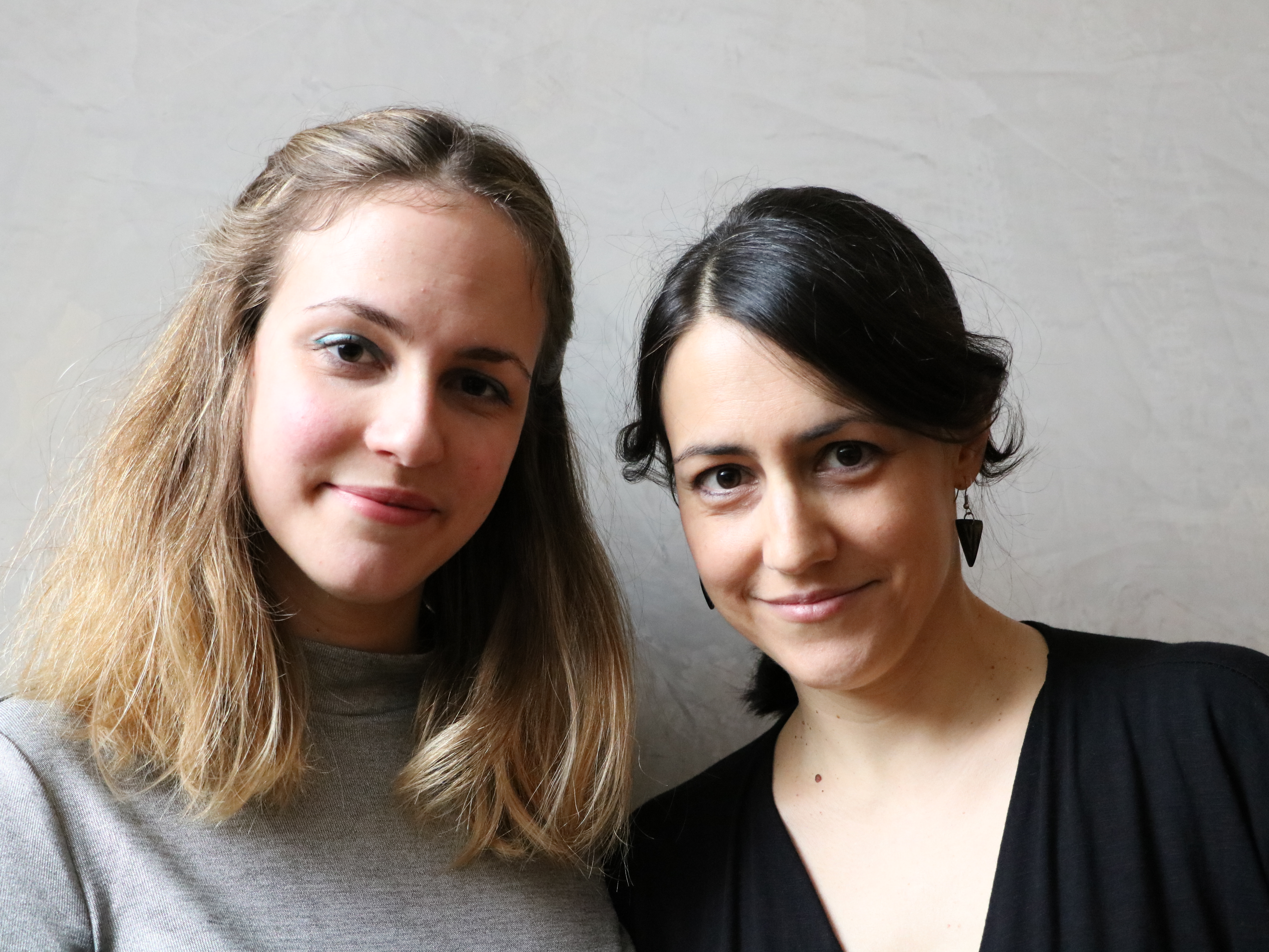 Sanja et Lidija Bizjak, pianistes, concert en duo, le 3 février 2017, Folle Journée, Nantes. 0514